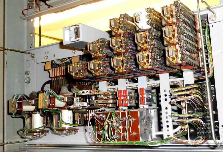 Für das Wählprüfnetz war in jeder Vermittlungsstelle ein Prüfgruppenwähler (Prüf-GW) vorhanden. In jedem Leitungswählergestell gab es einen Prüfleitungswähler (Prüf-LW) Das Bild zeigt den PrGW 55 für kleine Ortsnetze, damit konnten EMD- und HDW-Vermittlungsstellen überprüft werden.